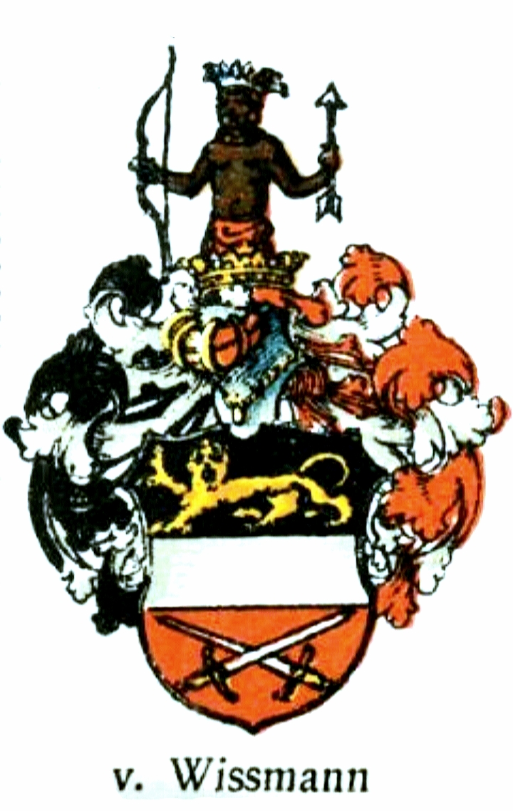 Wappen derer von Wissman, nach dem preußischen Adelsdiplom von 1890.